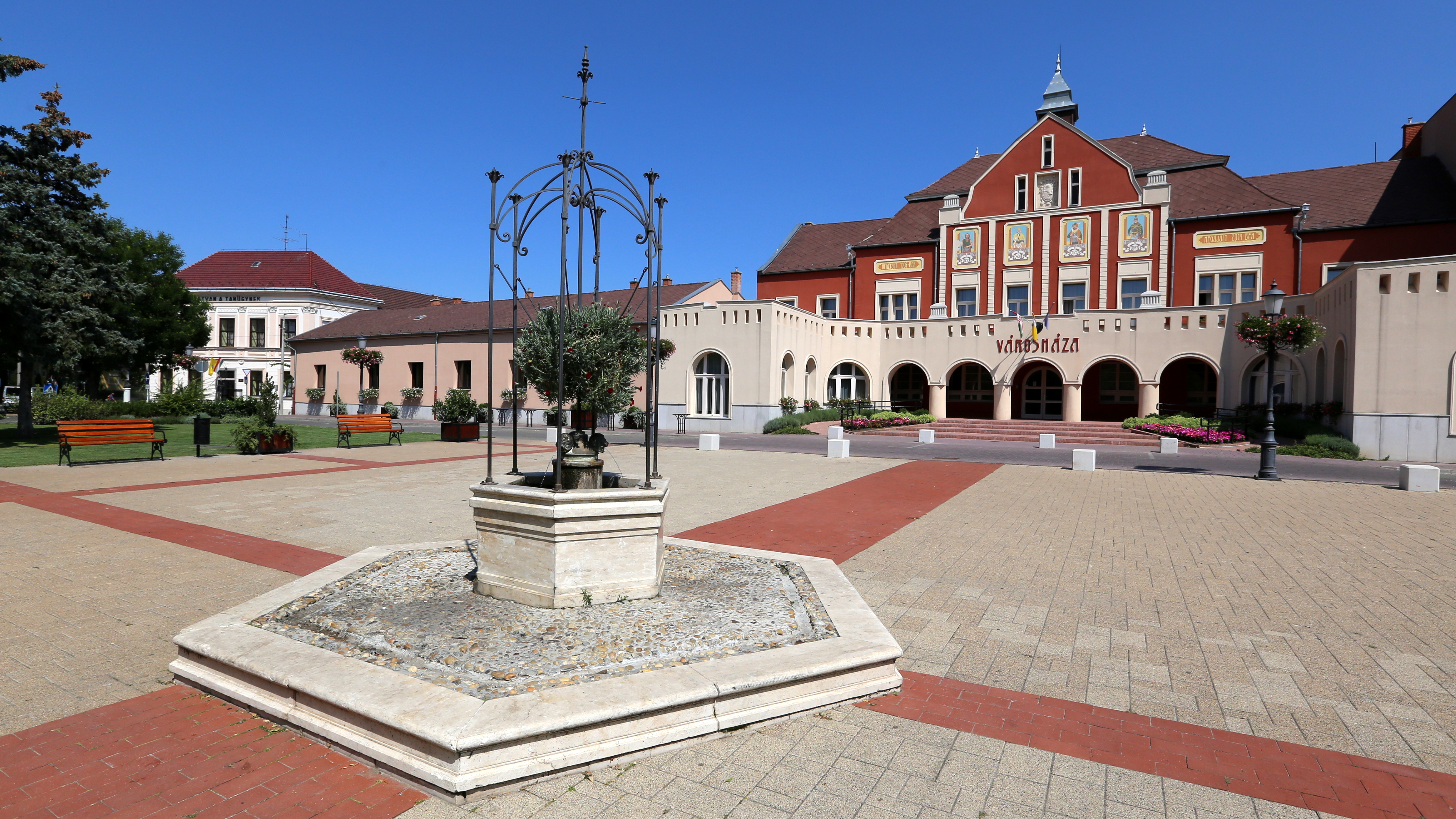 Hatvan, Városháza